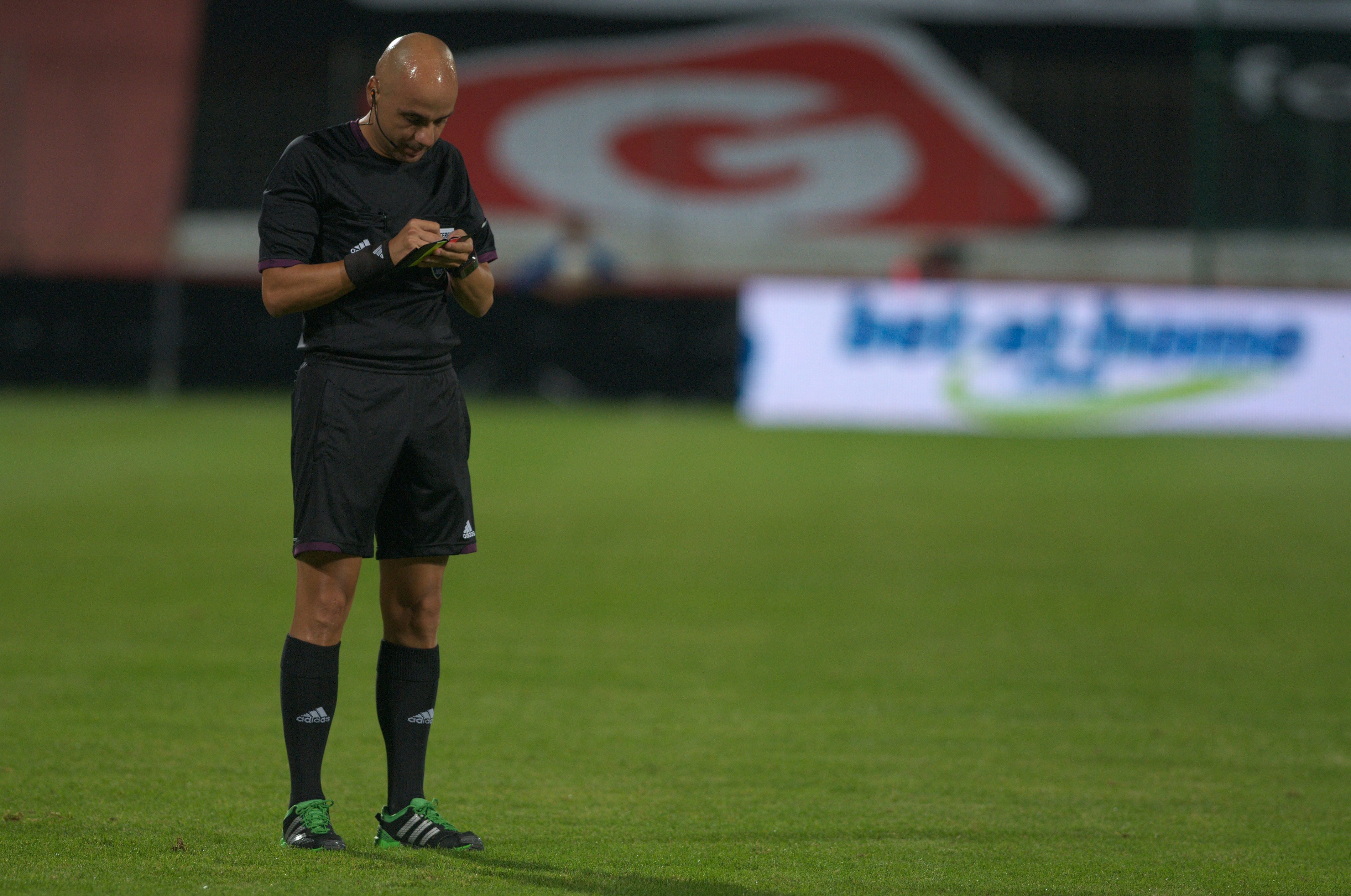 Der Schiedsrichter Leontios Trattou beim Europa-League-Qualifikationsspiel Admira gegen Zalgiris